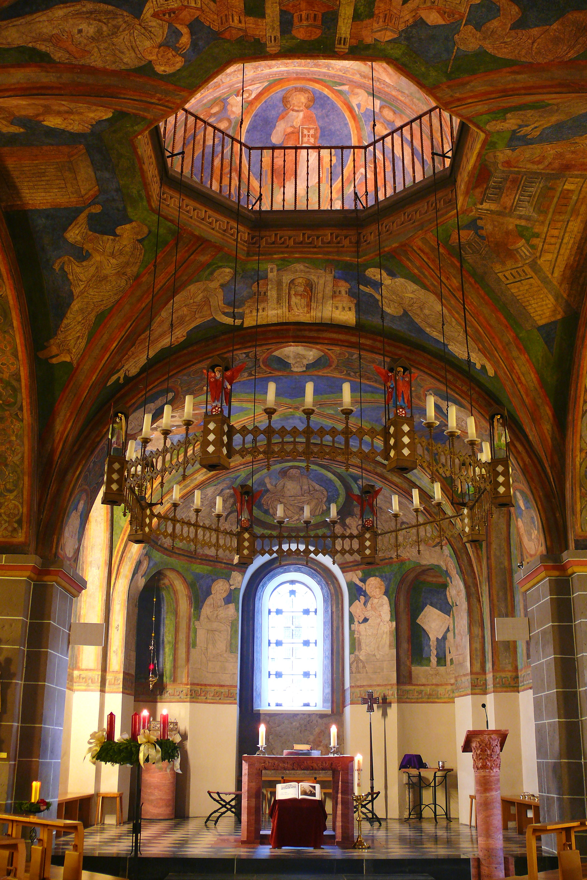 Das Innere der Kirche